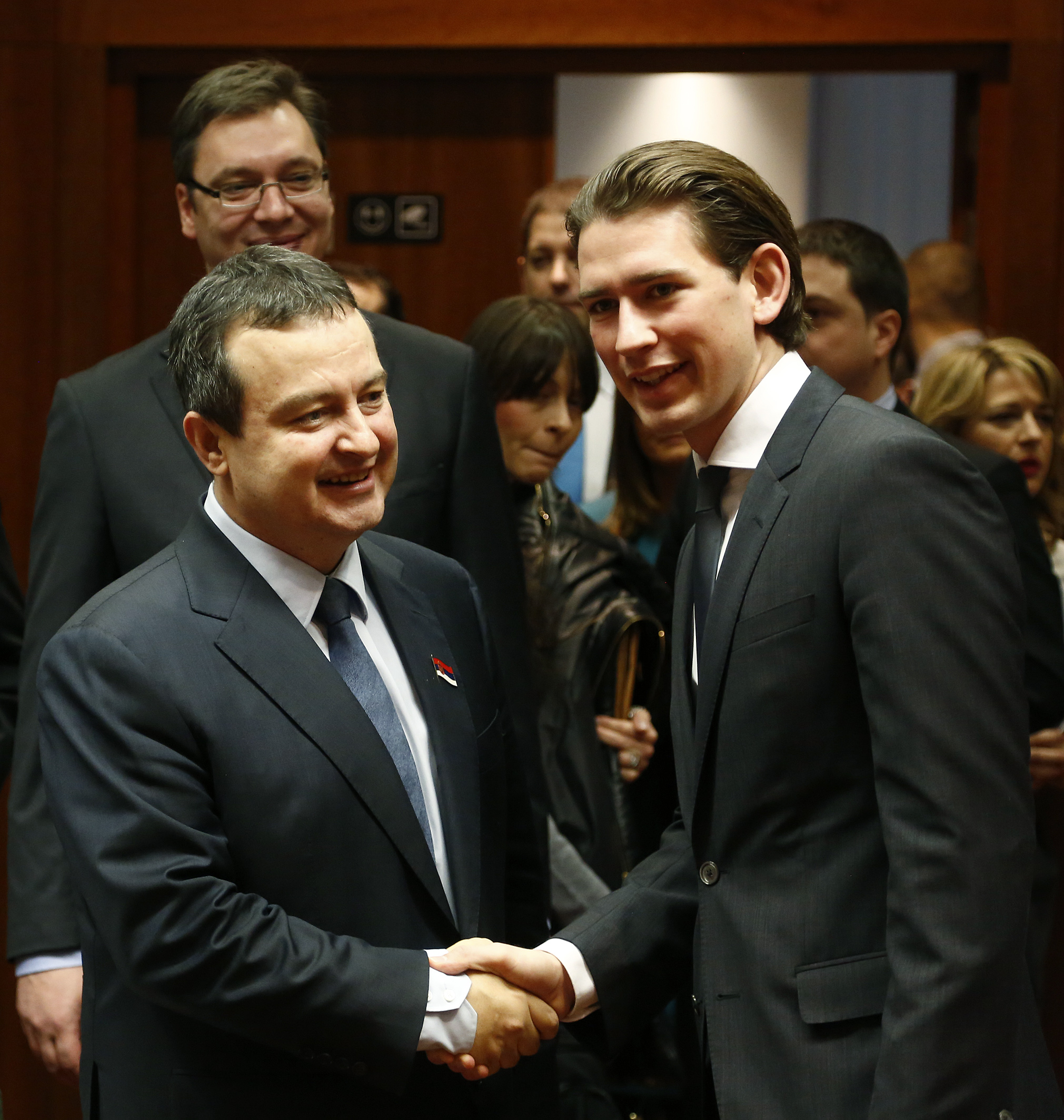 Regierungskonferenz zum Beitritt Serbiens zur EU. Außenminister Sebastian Kurz im Gespräch mit Premierminister Ivica Dacic und Vizepremier Aleksandar Vucic. Brüssel, 21.01.2013, Foto: Dragan Tatic